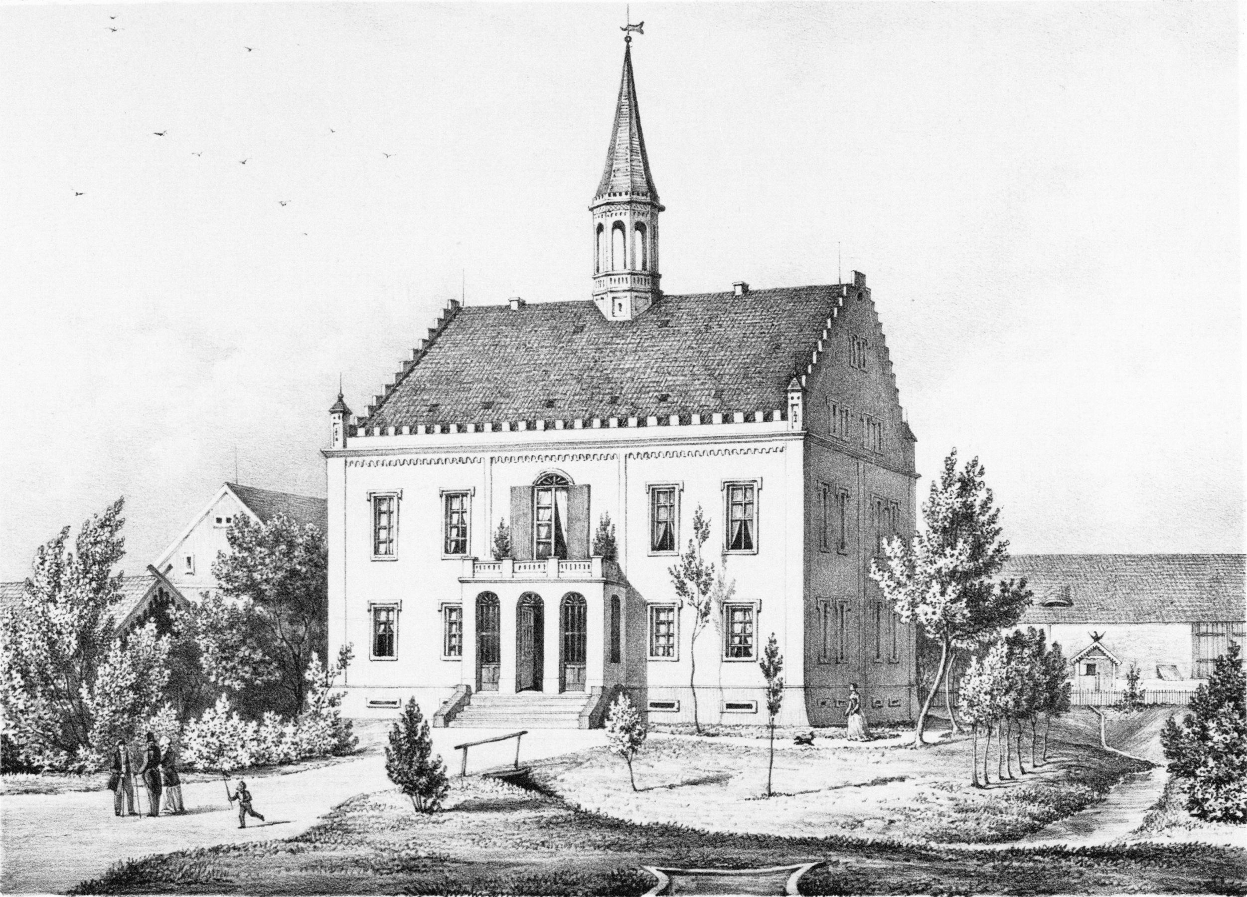 Das Rittergut Weidlitz Mitte des 19. Jahrhunderts